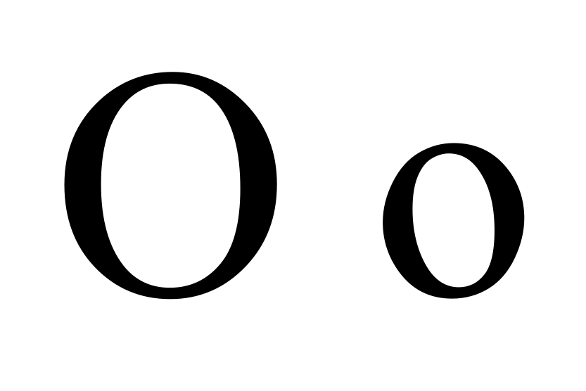 greek letter omicron